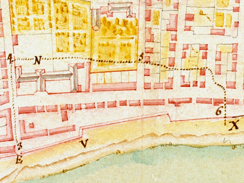 Lettre de Chaussegros de Léry au ministre de la Marine, 16 octobre 1734